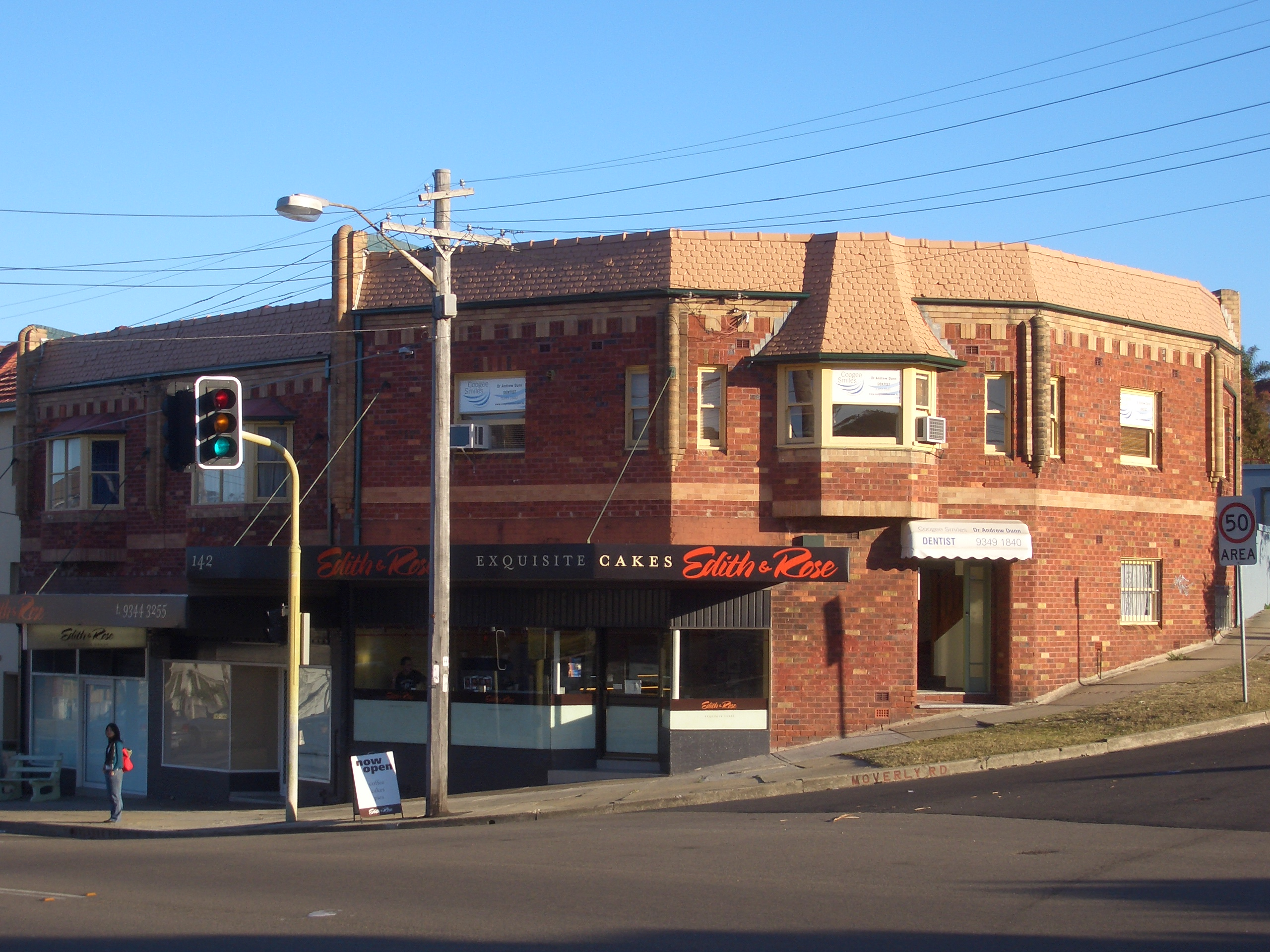 Malabar Road, South Coogee